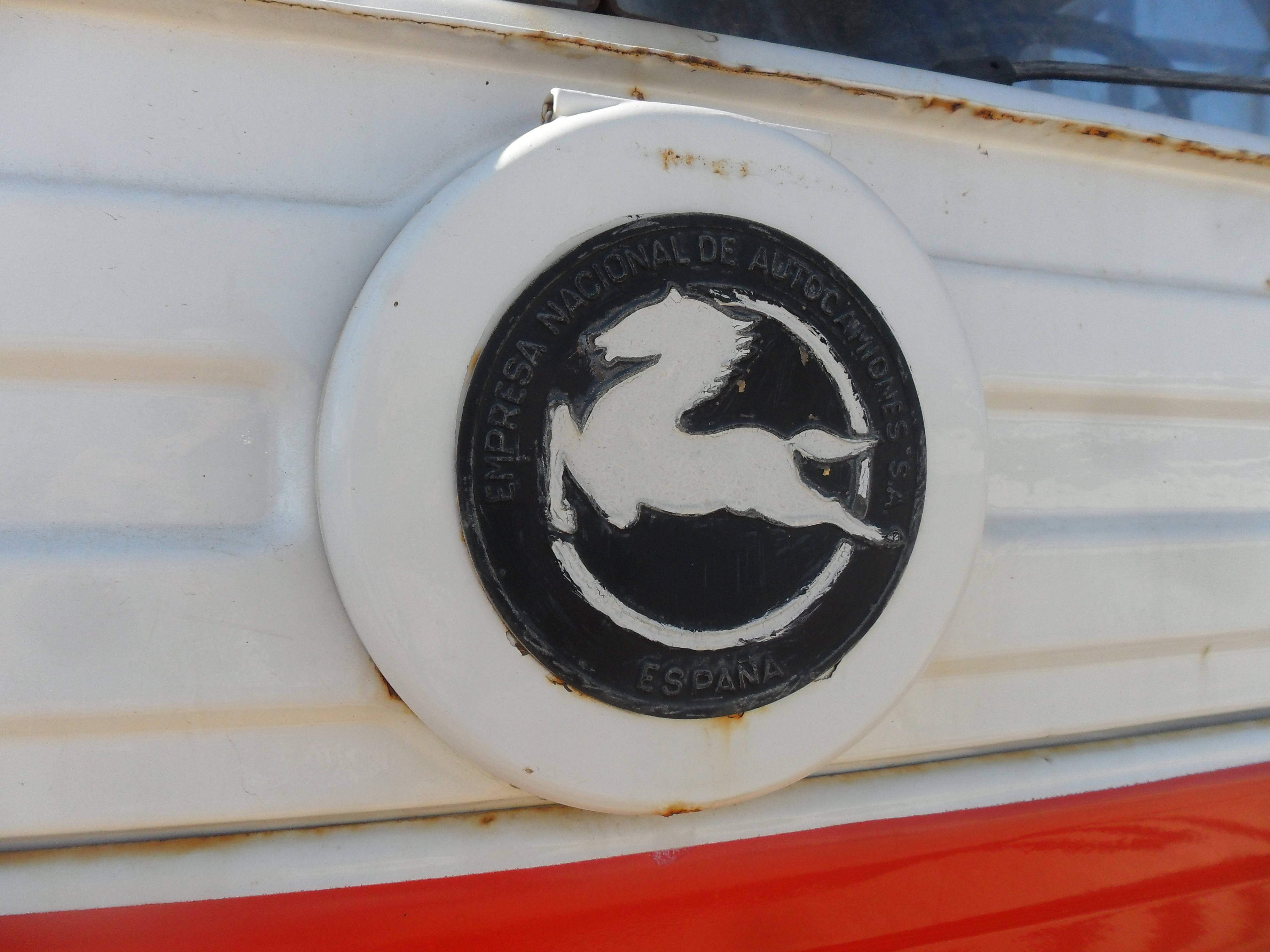 Pegaso Comet 1090DR en Cabo de Gata